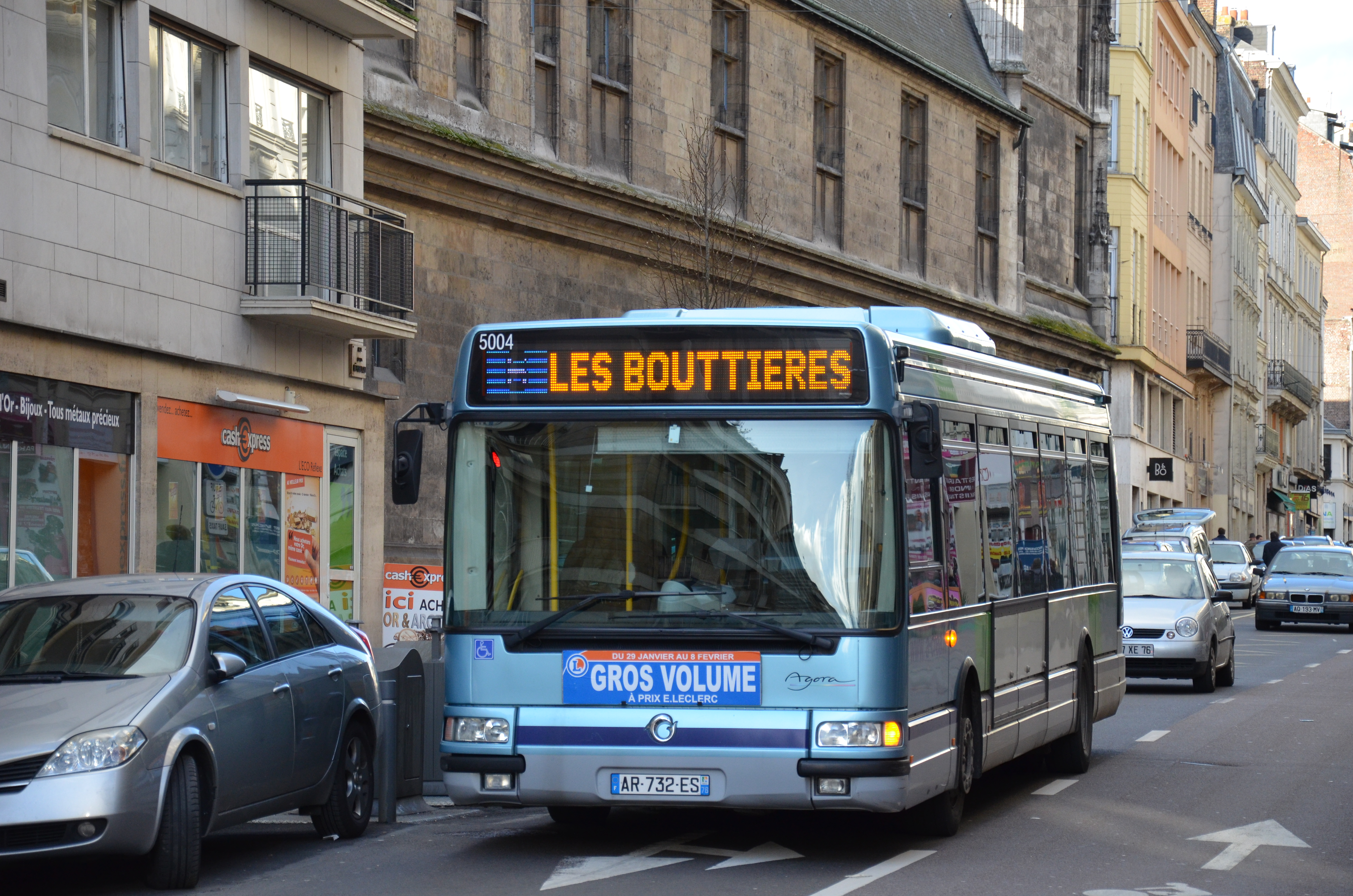 Irisbus Agora S n°5004 près de l'arrêt République, sur le réseau ASTUCE de Rouen sur la ligne 6.